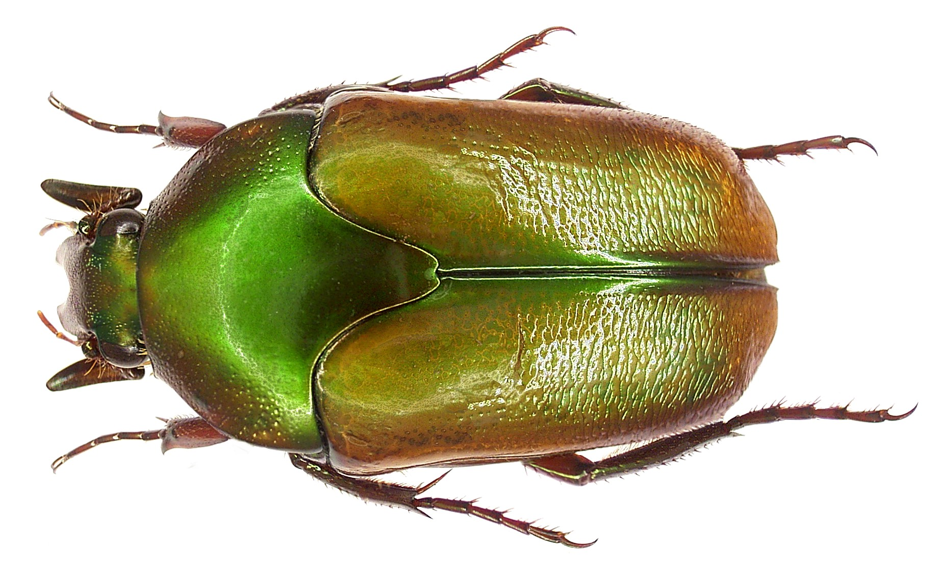 Familie: Scarabaeidae Grösse: 24,8-25,9 mm Fundort: Indonesien, Irian Jaya, Ransiki leg.det. A.Skale, 2007 Foto: U.Schmidt, 2007